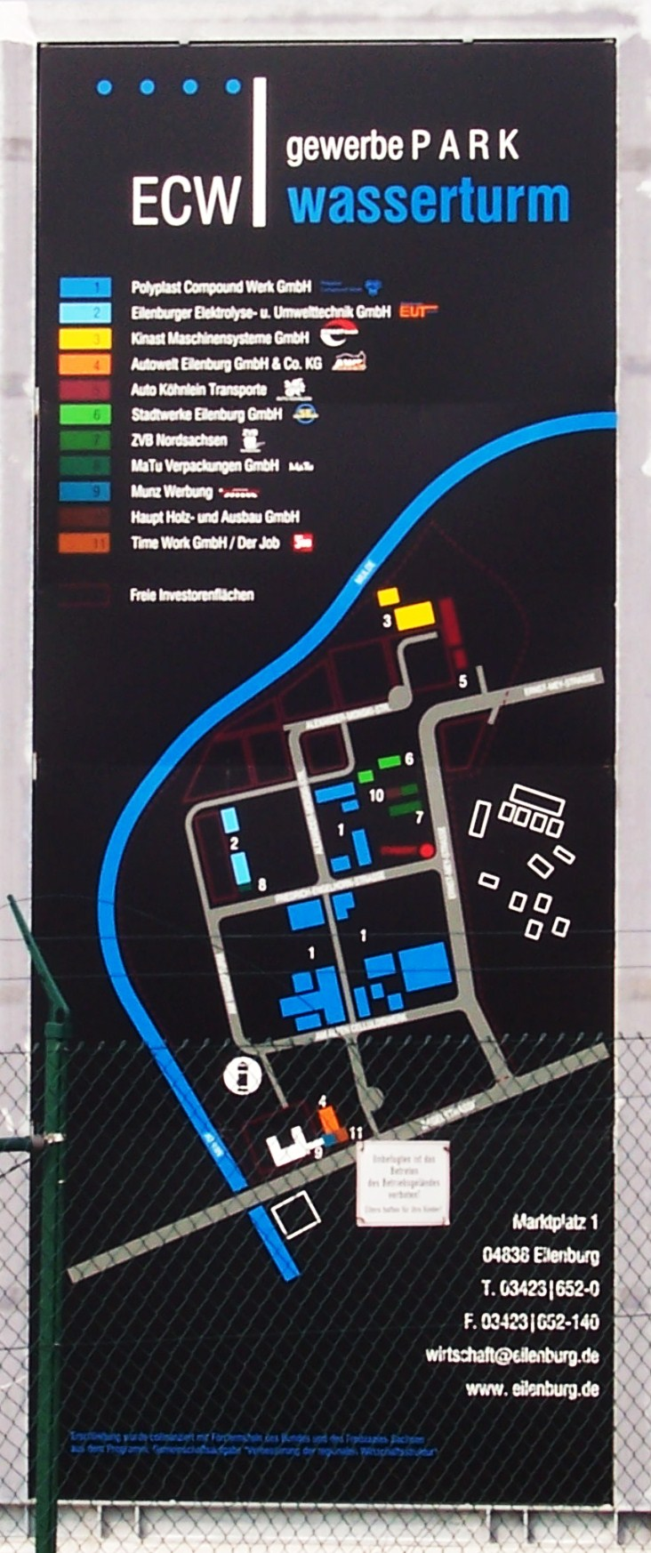 Tafel am Eingang zum Gewerbepark ECW in der Ernst-Mey-Straße